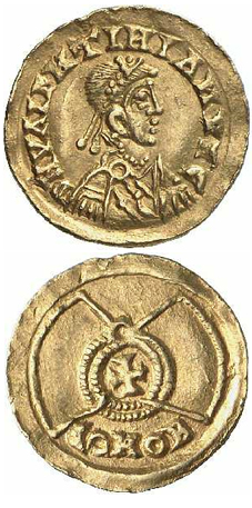 קראַנטקייַט סוואַביאַן מלך פון גאַליציע, רעקוויאַריאָ (425-585) מינץ: בראַגאַ נומיסמאַטיק קאַלעקשאַן, נאַציאָנאַלער מוסעומס אין בערלין